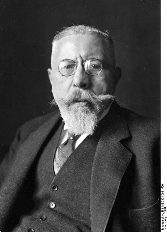 Bernhard Falk Scherl Bilderdienst Falk, Bernhard, D.P: Landtag 9037-28 [Porträt Bernhard Falk; Aufnahme 1928] Abgebildete Personen: Falk, Bernhard: Justizrat, Deutschland